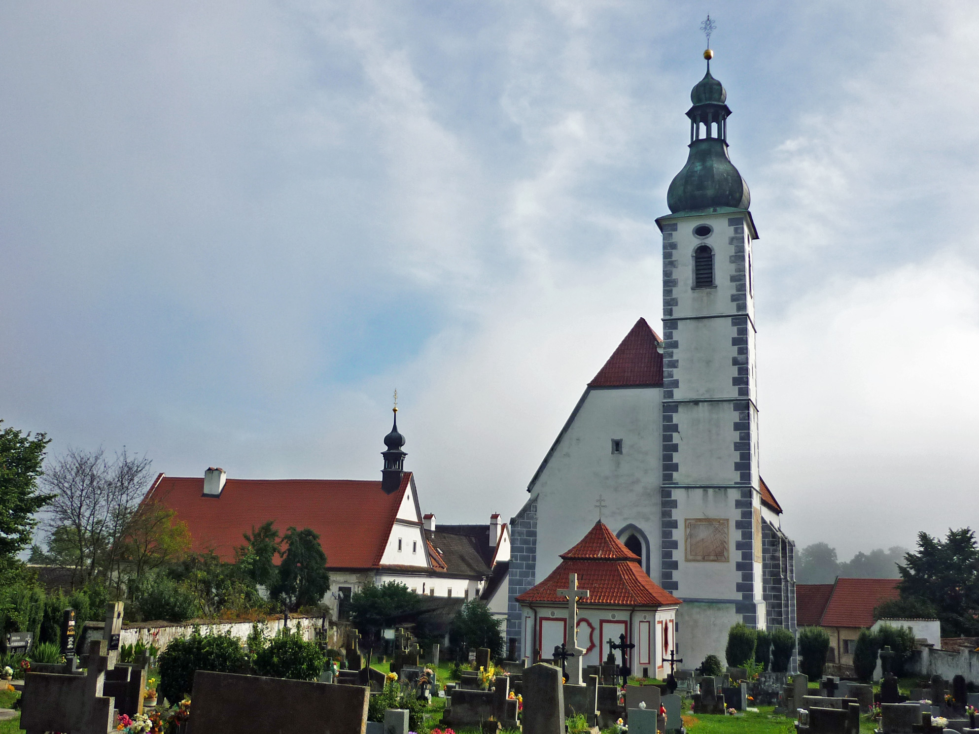 Wallfahrtskirche Maria Gojau in Kájov